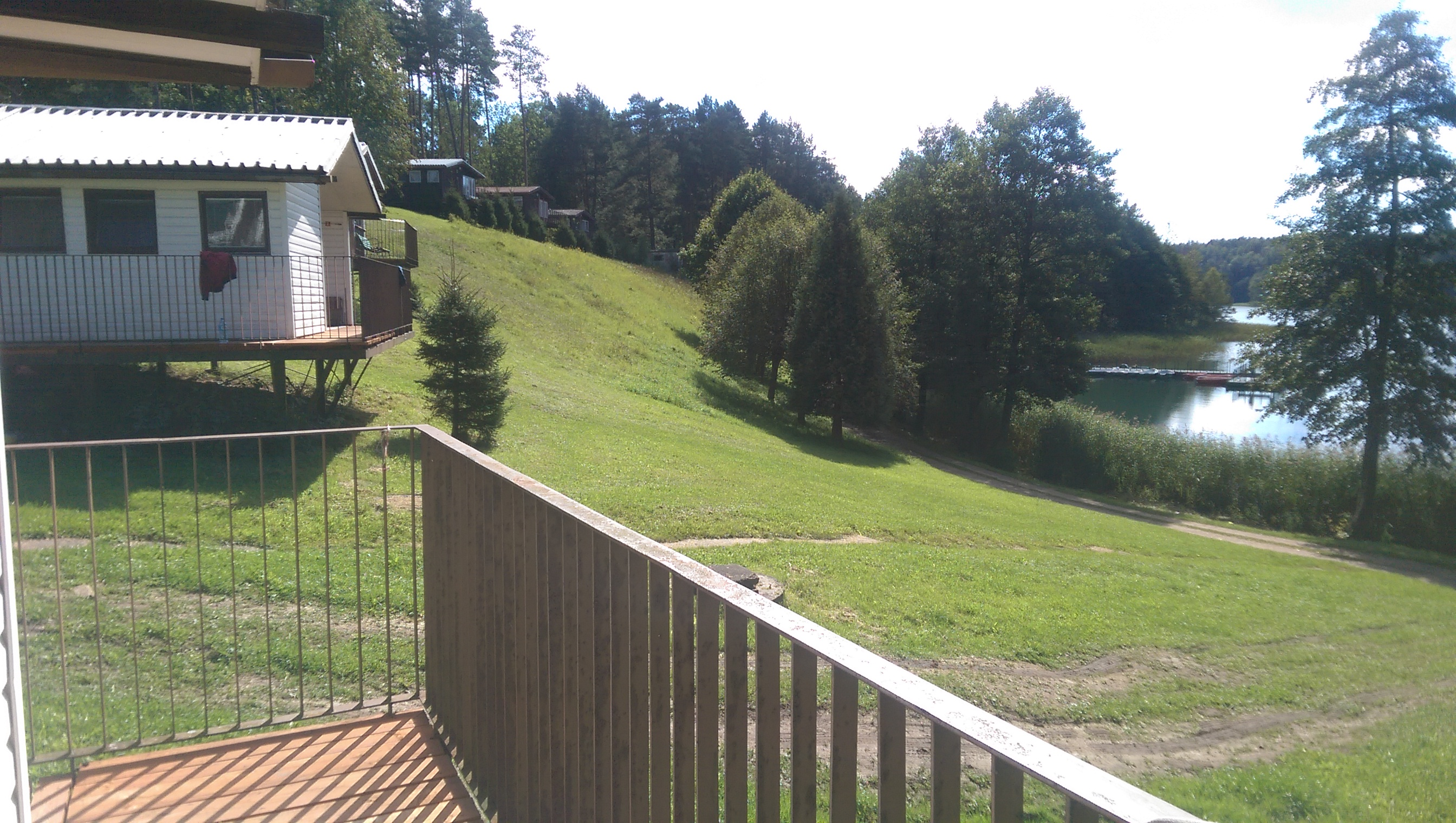 Maradki